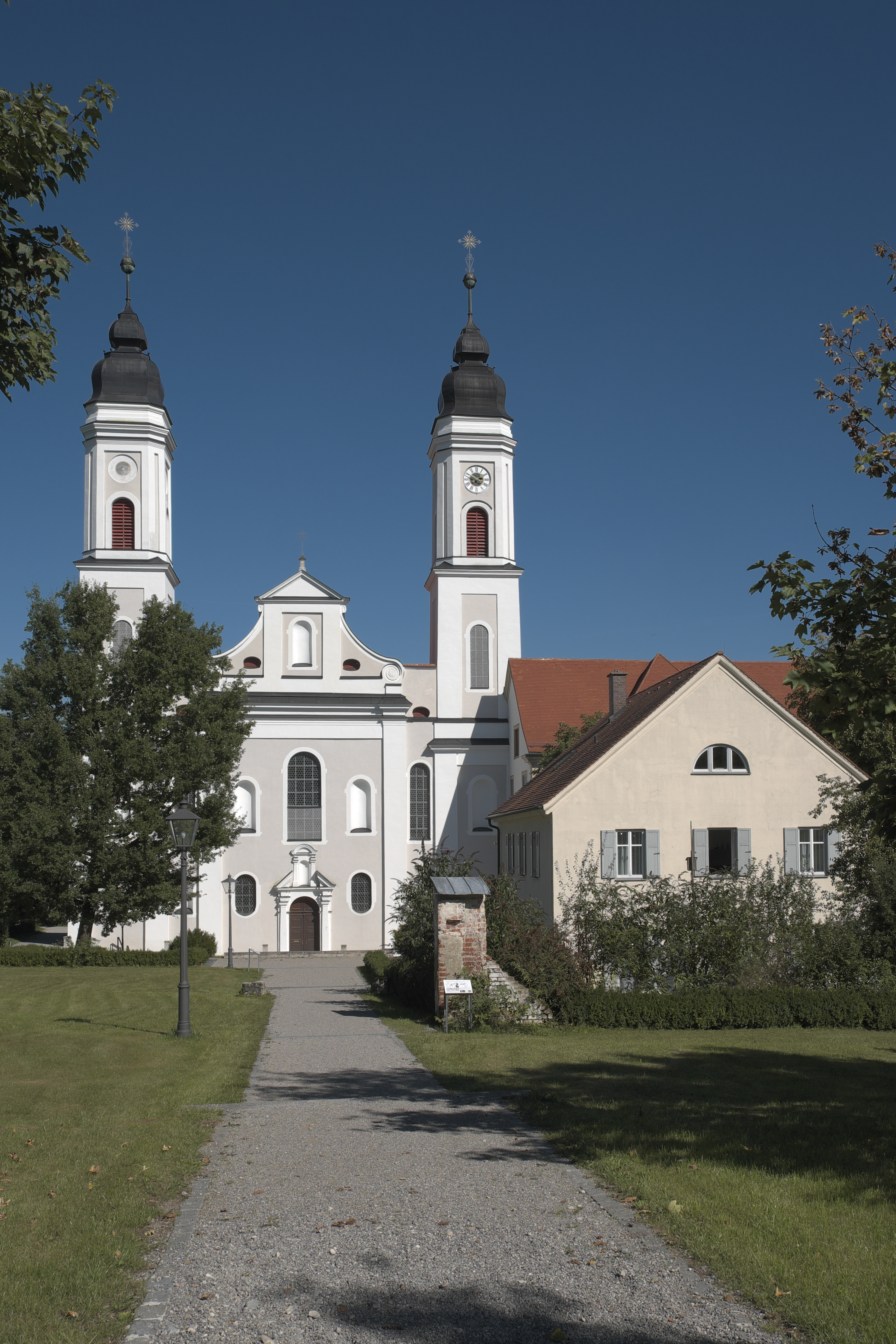 Ehemalige Benediktinerklosterkirche, heute katholische Pfarrkirche Mariä Himmelfahrt und Peter und Paul, in Irsee im Landkreis Ostallgäu in Schwaben (Bayern/Deutschland)